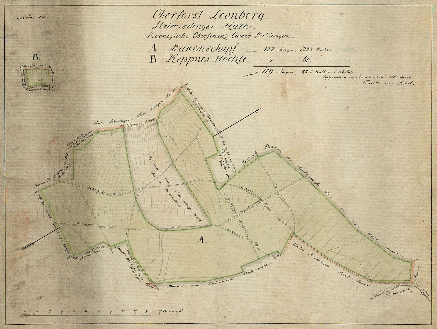 1813 erfasste Anteile der königl. württ. Oberfinanzkammer am Muckenschupf (A) mit dem „Keppner-Hölzle“ (B), heute „Klepperhölzle“, (1815 von Gutsherrn Leutrum von Ertingen gegen den „Strittwald“ eingetauscht).